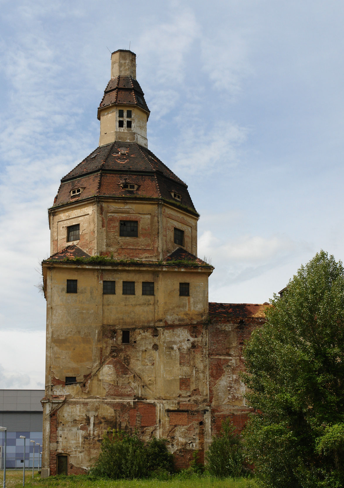 Turm des Erlwein'schen Kesselhauses im Ostragehege